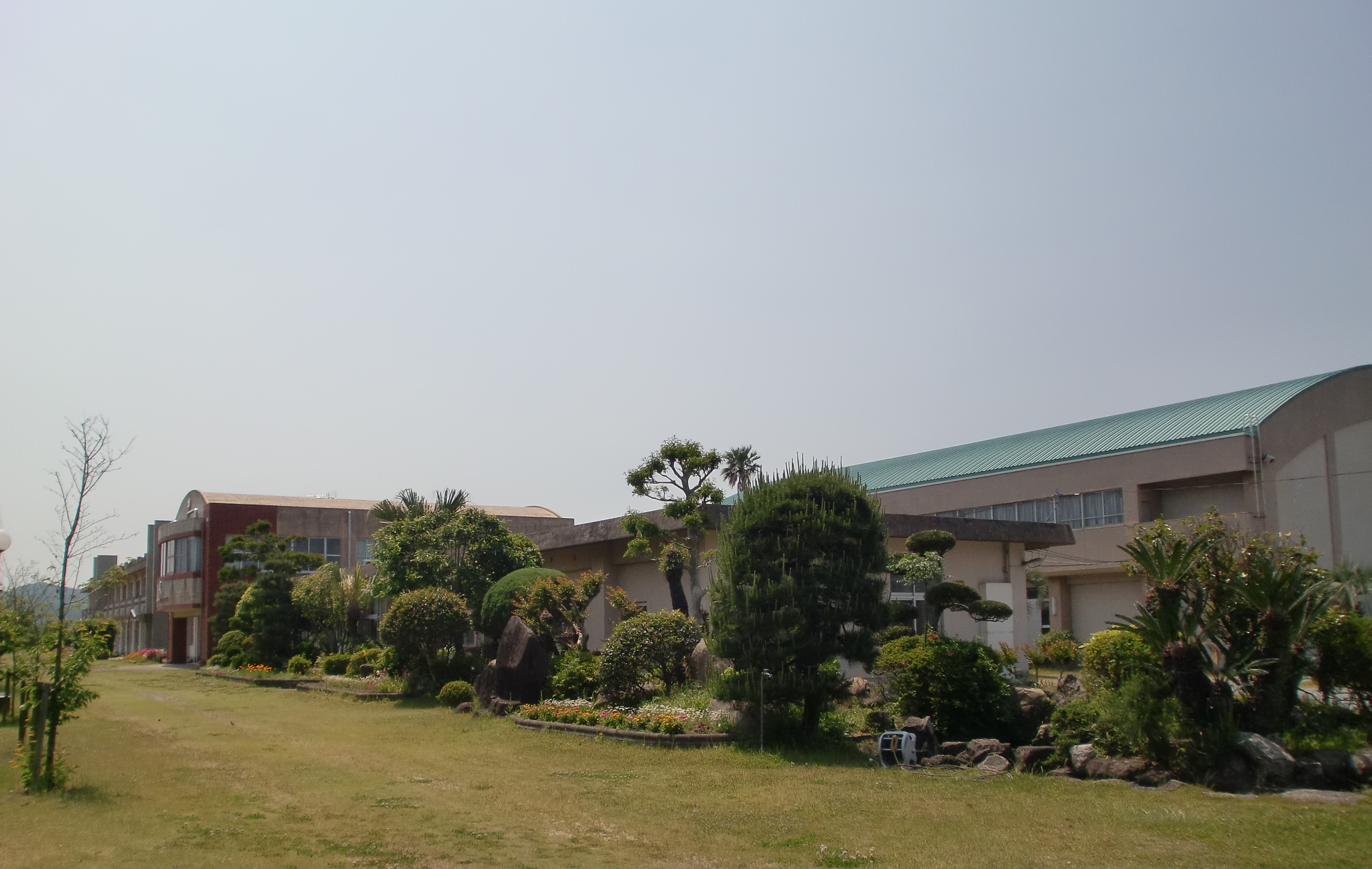 南さつま市立万世中学校の校舎。